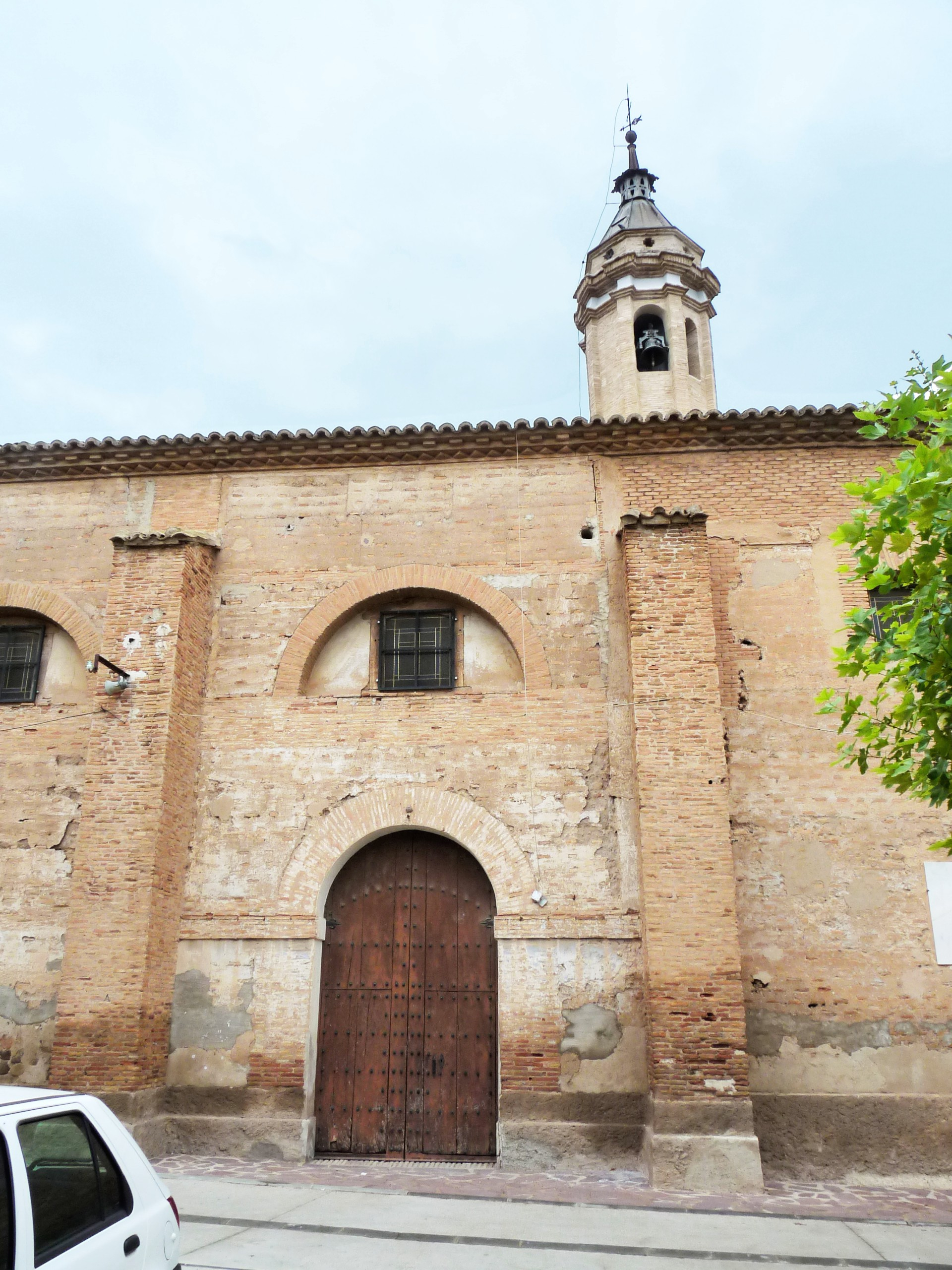 Bulbuente - Iglesia de Santa María (s. XV; torre y ampliaciones s. XVII)